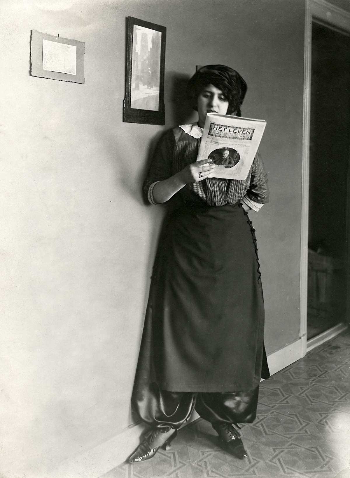 Nationaal Archief / Spaarnestad Photo / Het Leven / Fotograaf onbekend, SFA022008631. Damesmode. Nederlandse actrice Sophie de Vries in broekrok op de redactie van tijdschrift Het Leven, maart 1911. In een interview vertelt Sophie over de weddenschap om zich 15 min. in jupe-culotte in Amsterdam te vertonen, wat op verschillende plekken tot een opstootje leidt. Het Leven wijdt een cover-foto plus een artikel van 7 pagina's aan de gebeurtenis. Dutch actrice Sophie de Vries wearing culottes in Amsterdam, in connection with a bet. Picture shows Sophie at the office of magazine "Het Leven". Amsterdam, the Netherlands, march 1911. Collectie Spaarnestad Voor meer informatie en voor meer foto’s uit de collectie van Spaarnestad Photo, bezoek onze Beeldbank: U kunt ons helpen onze kennis van de fotocollecties te verrijken door tags en commentaren toe te voegen. Herkent u mensen of locaties of heeft u een bijzonder verhaal te vertellen bij één van de foto’s, laat dan een reactie achter (als u ingelogd bent bij Flickr) of stuur een mailtje naar: You can help us gain more knowledge on the content of our collection by simply adding a comment with information. If you do not wish to log in, you can write an e-mail to